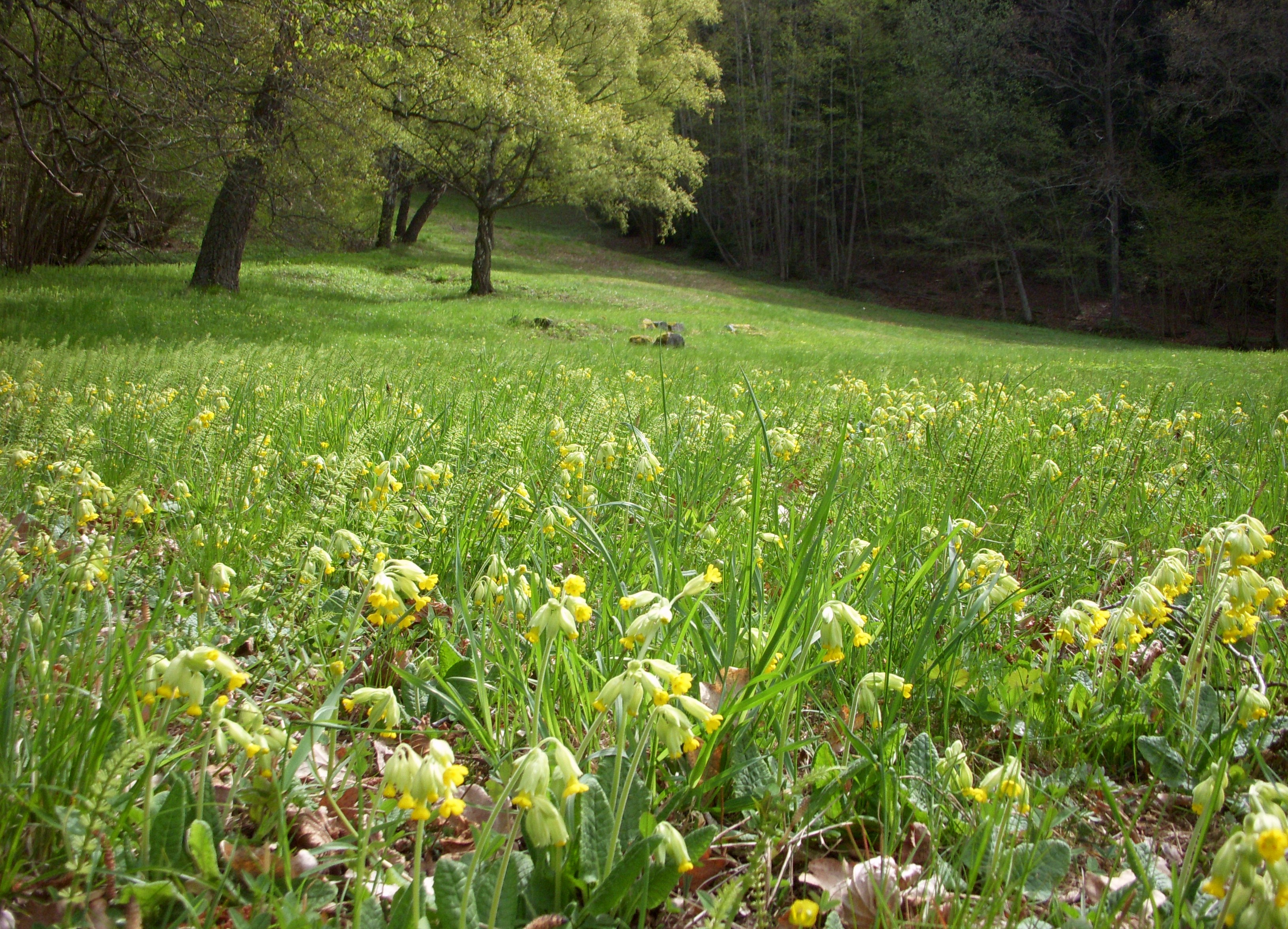 Gömsta ängs naturreservat